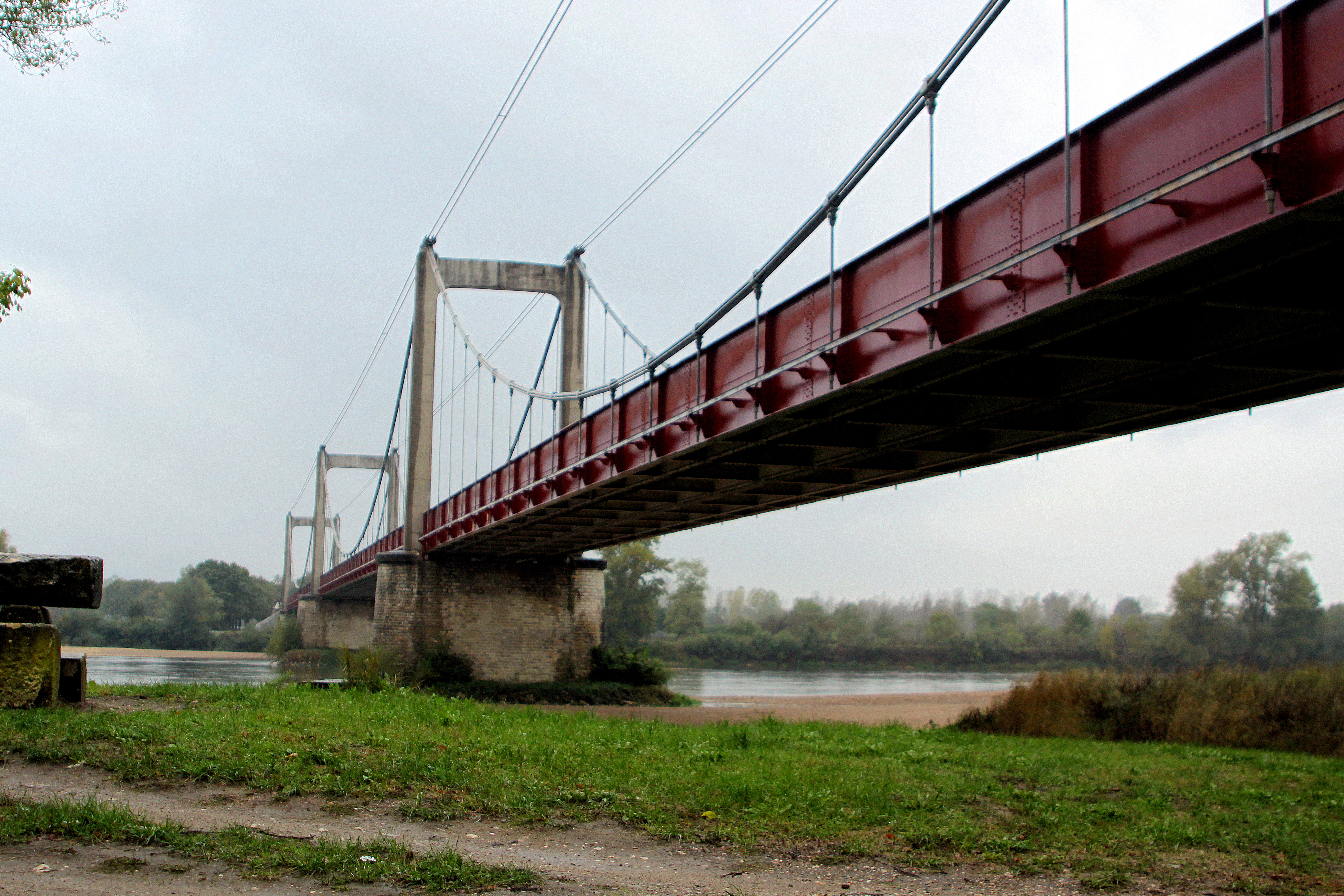 D'Hänkbréck vu Bonny-sur-Loire